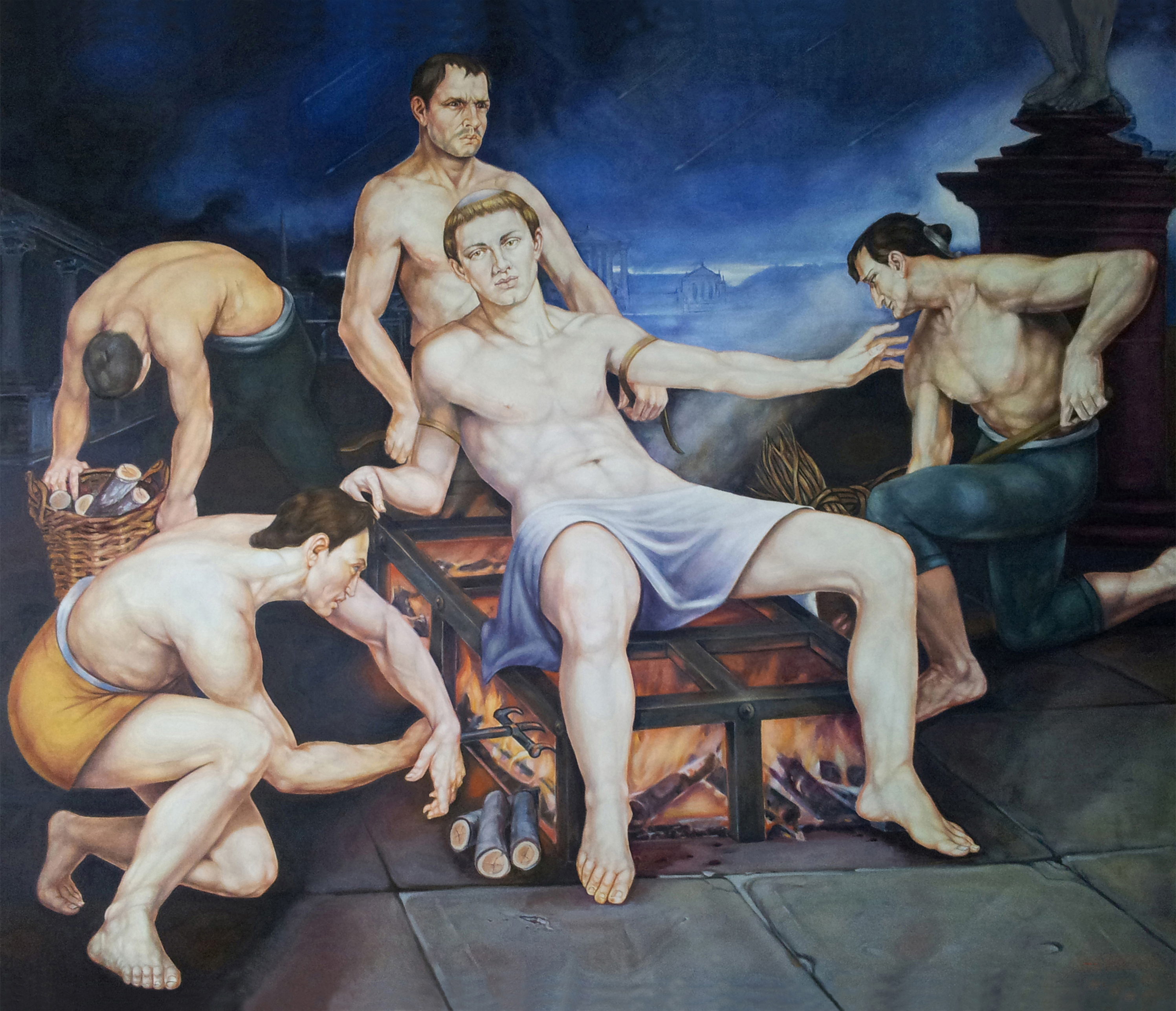 Chiesa di San Lorenzo Martire quadro olio su tela